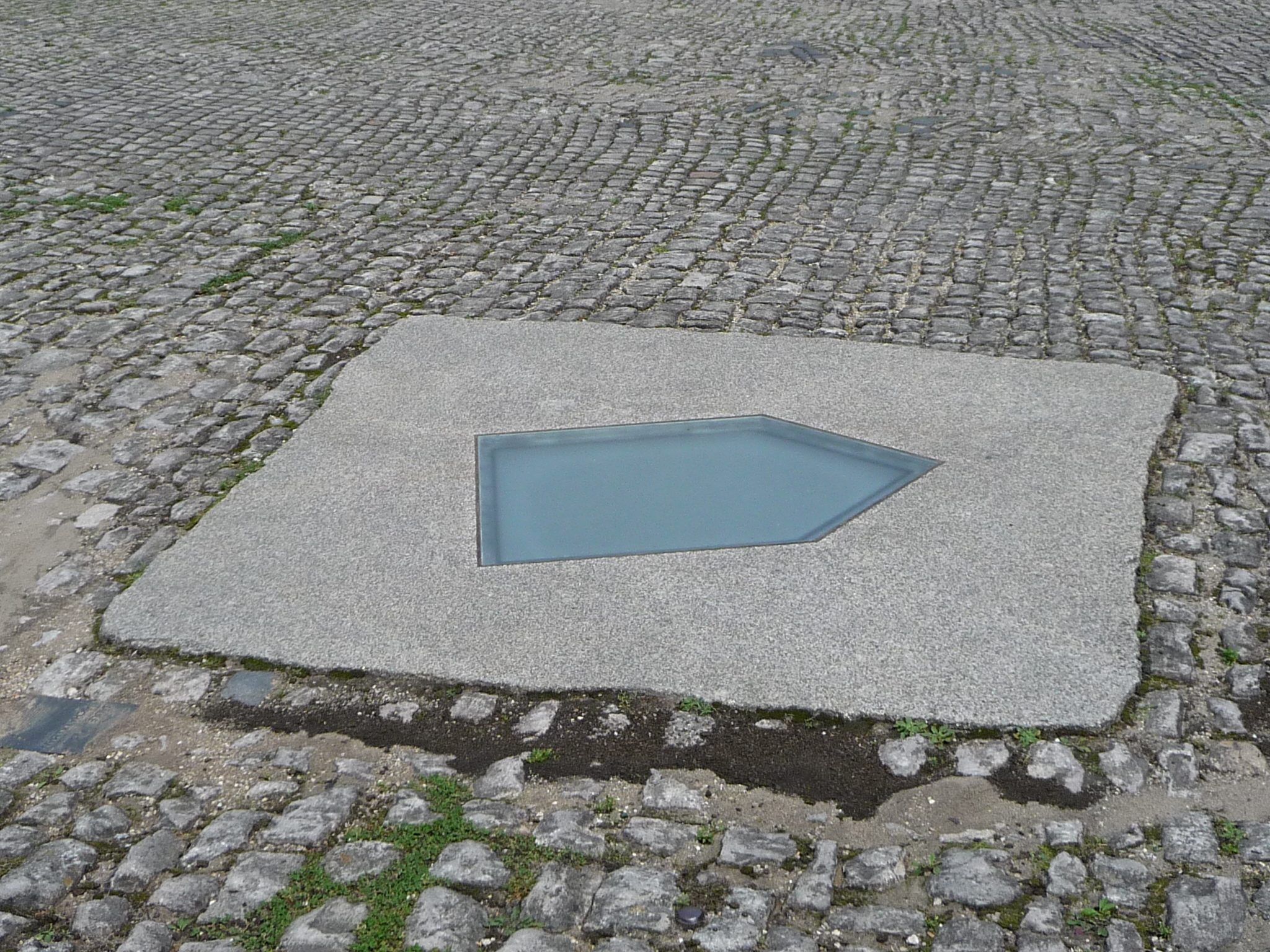 Zur Tausendjahr-Feier des Bistums Bamberg, 2007, wurde der so genannte Nabel der Welt von dem israelischen Künstler Micha Ullman errichtet.